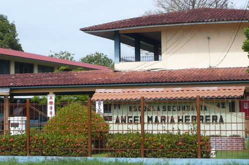 Escuela Secundaria Angel Maria Herrera